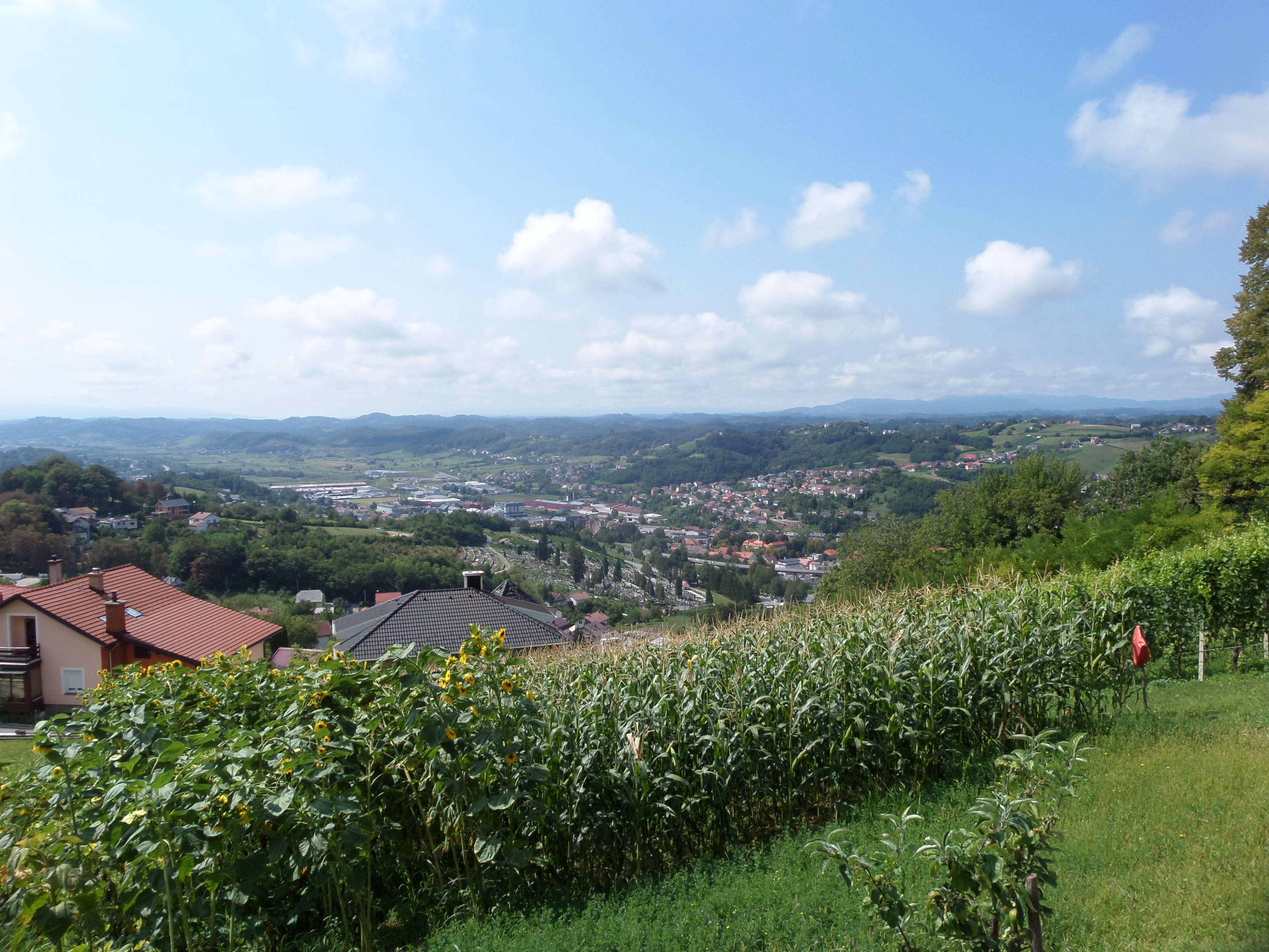 16.08.2016. -49000, Šušelj Brijeg, Kroatien